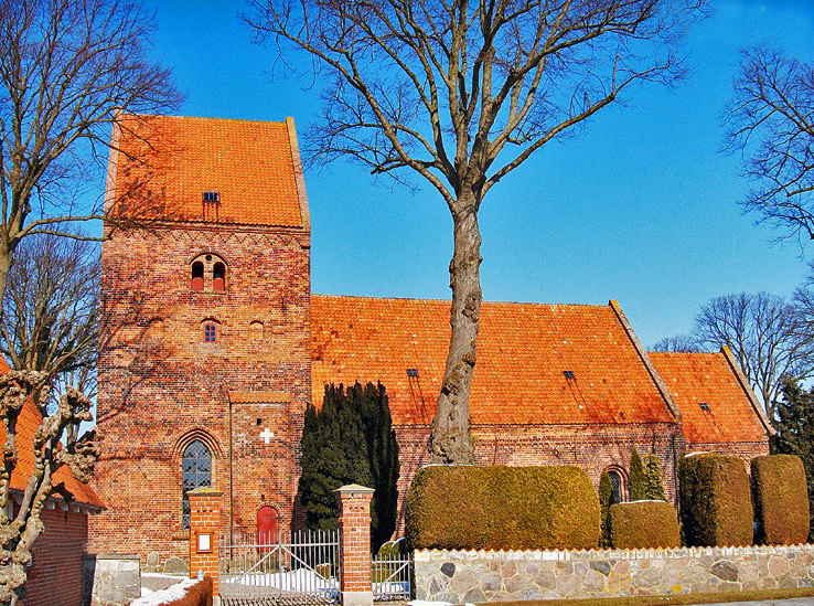 fra syd